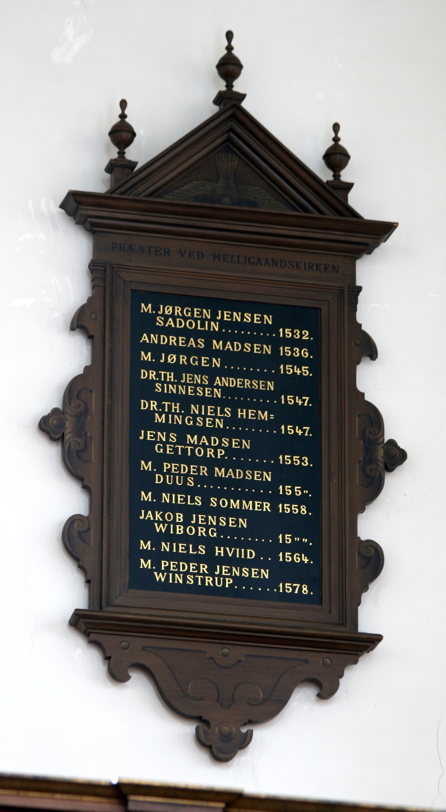 Helligåndskirken, Copenhagen, Denmark. Series pastorum, part 1. 1532-1578.